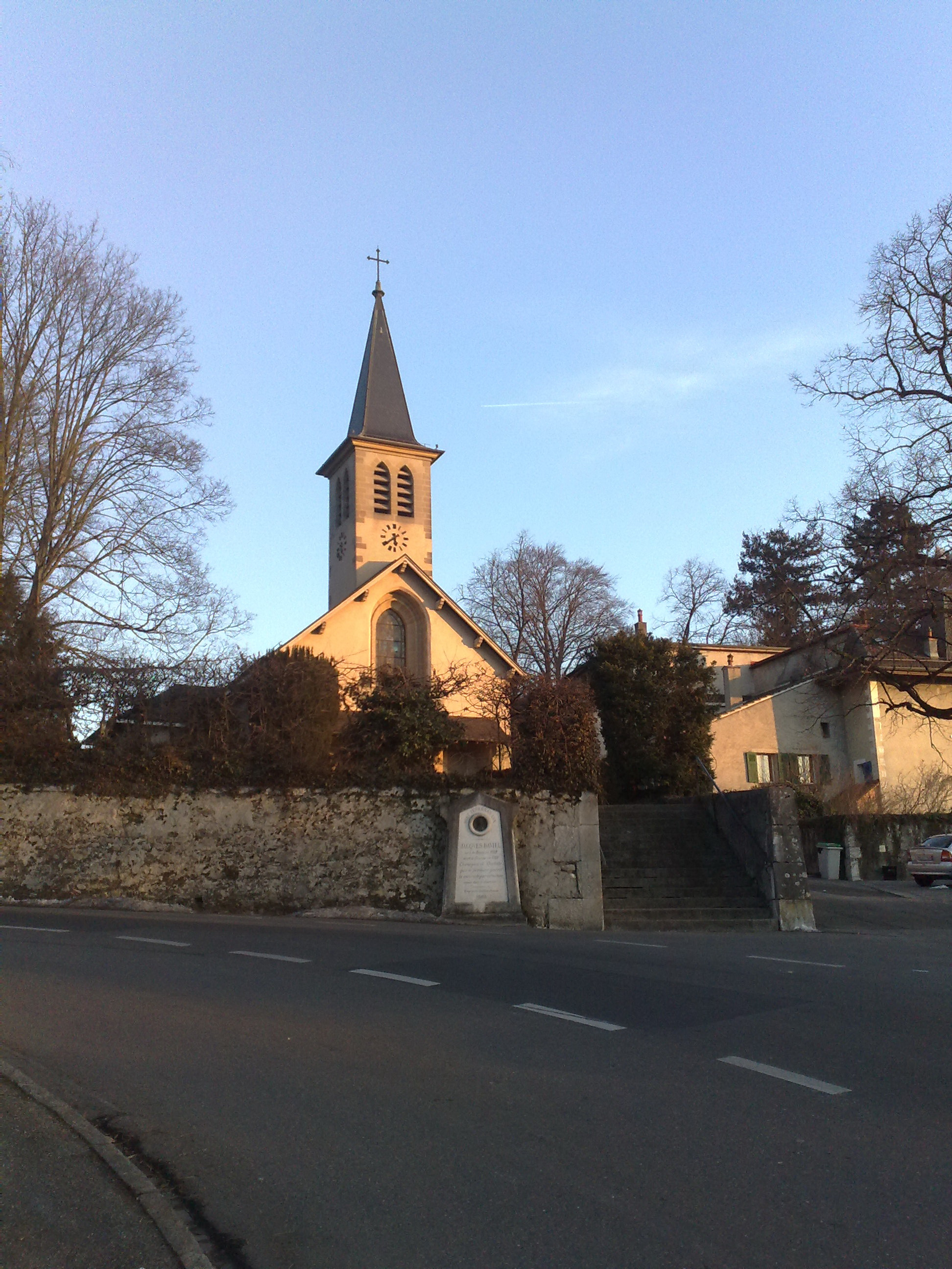 Eglise Grand-Saconnex